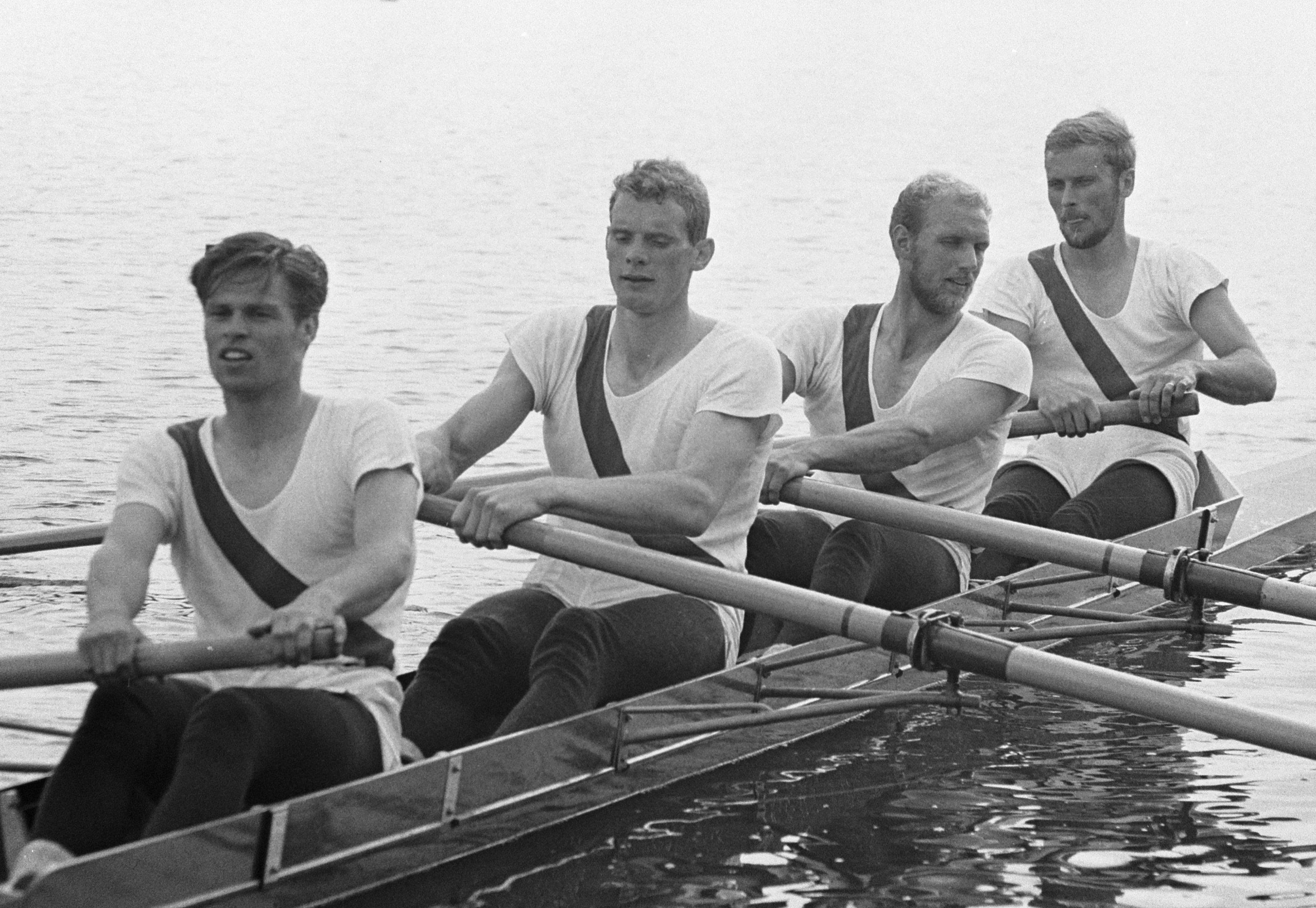 Europese roeikampioenschappen Bosbaan, 8 en 9 Deense vier zonder